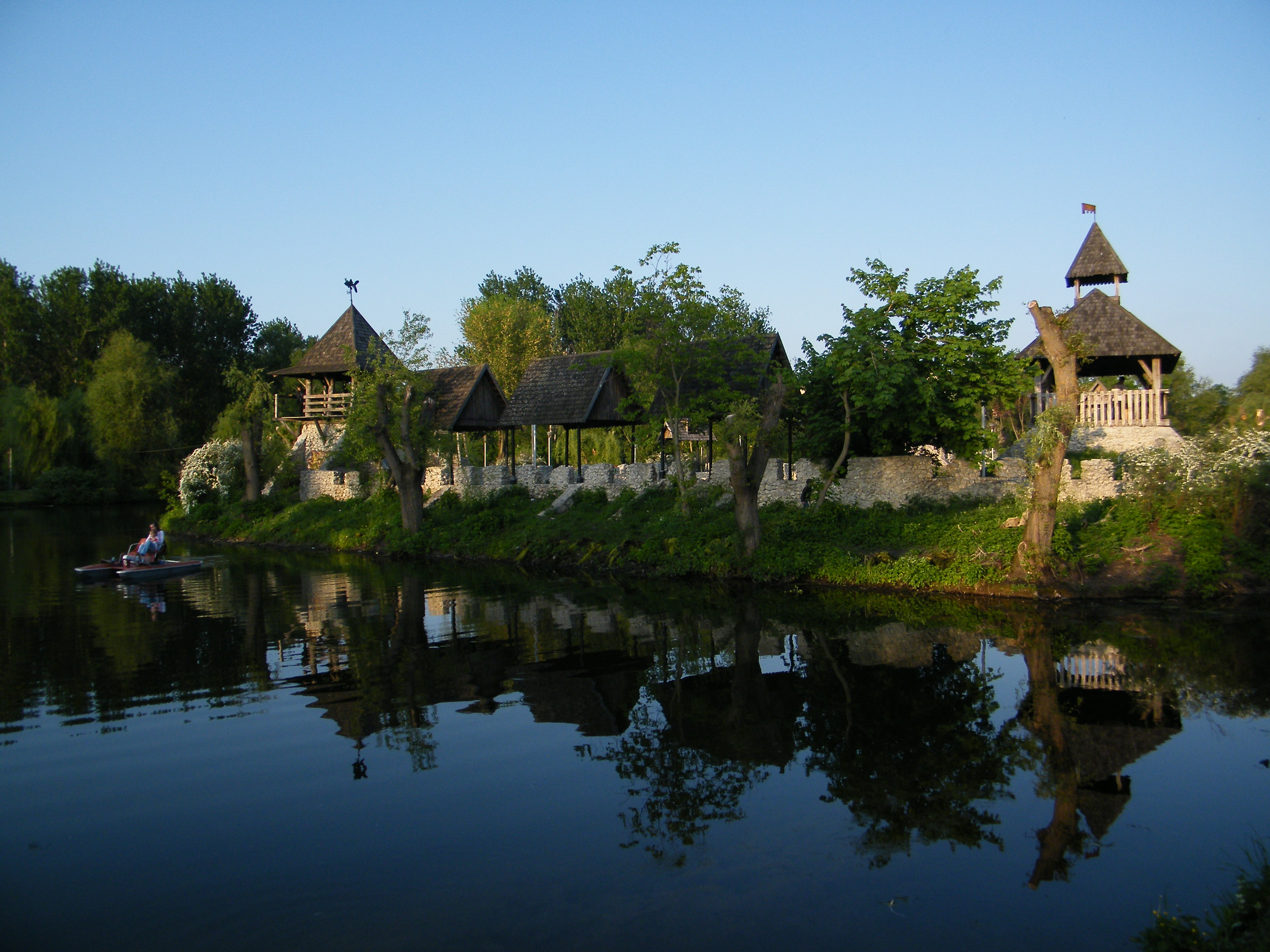 Казацкий городок в гидропарке "Топильче"